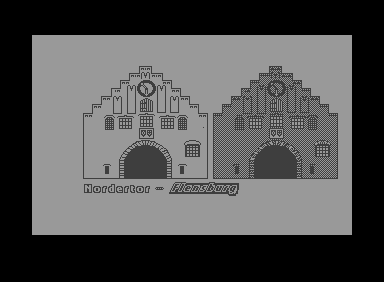 C64 Hires-Grafik von Flensburgs Nordertor die ich damals mit einer GEOS 64 Version (Geopaint) pixelte